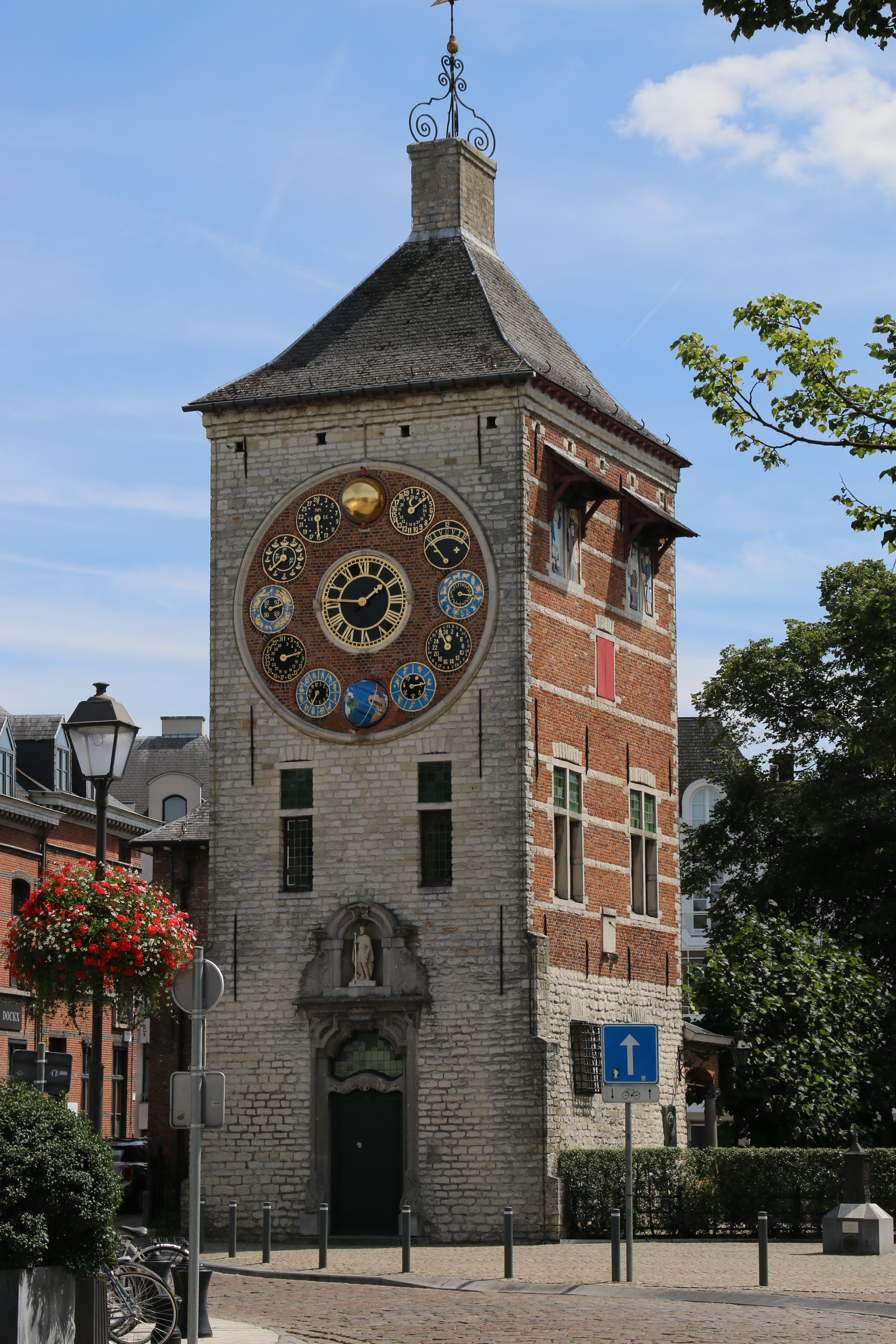 Lier Zimmertoren